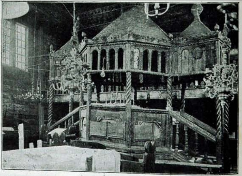 Zabłudów (pow. białostocki). Wnętrze z widokiem na bimę.